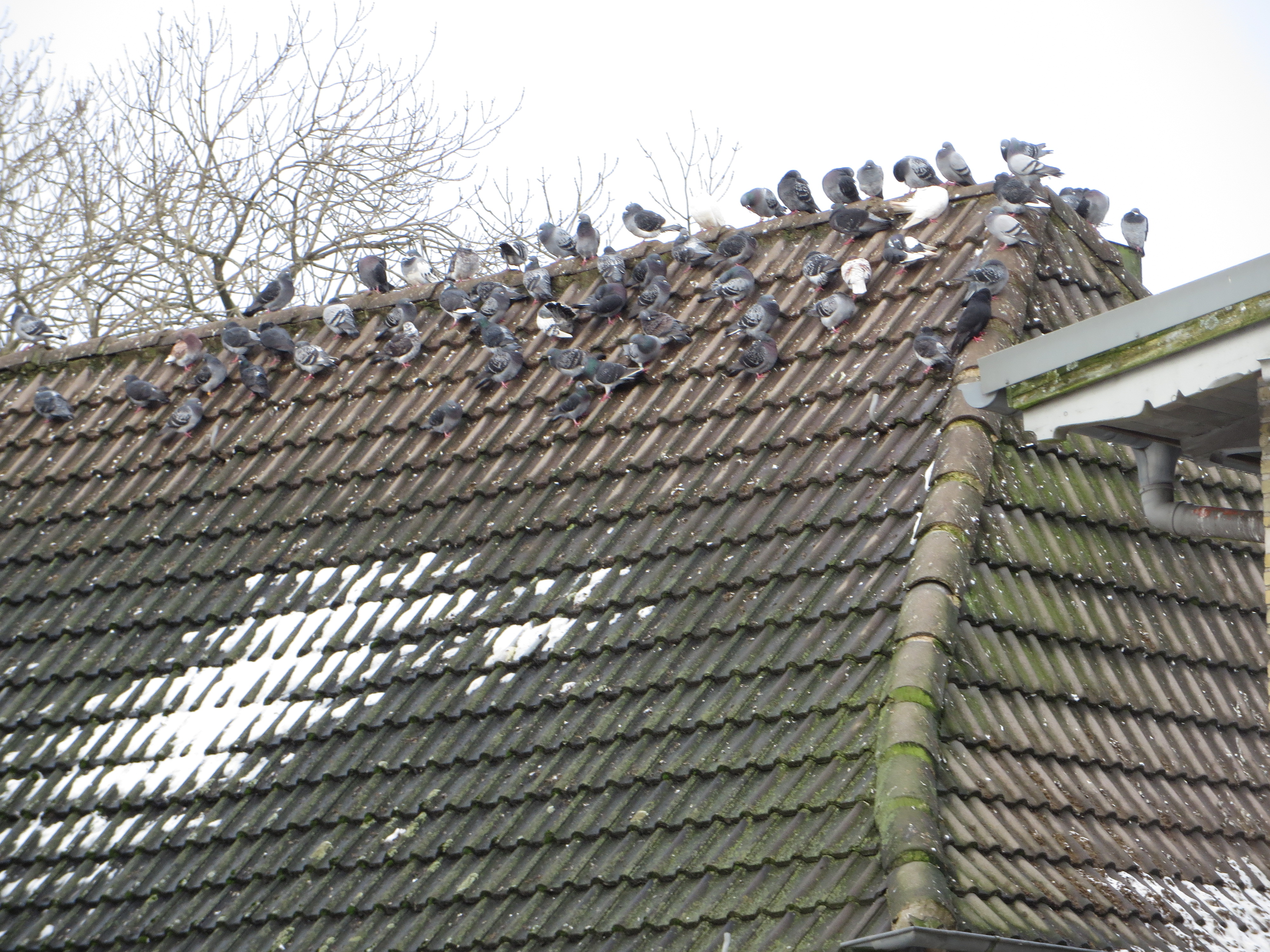 Alt-Fruerlundhof Tauben (Flensburg 2015), Bild 01